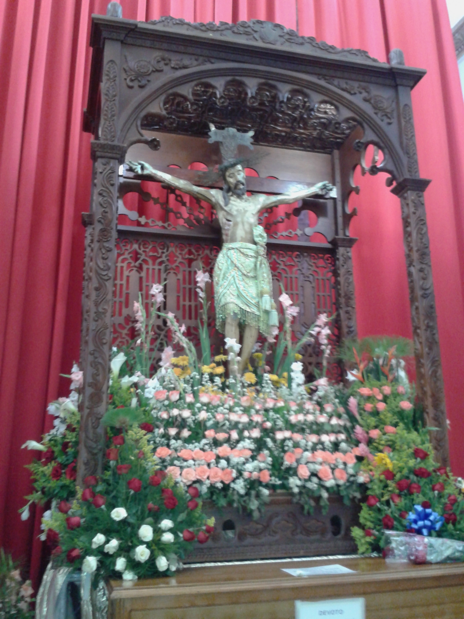 iglesia del Espíritu Santo